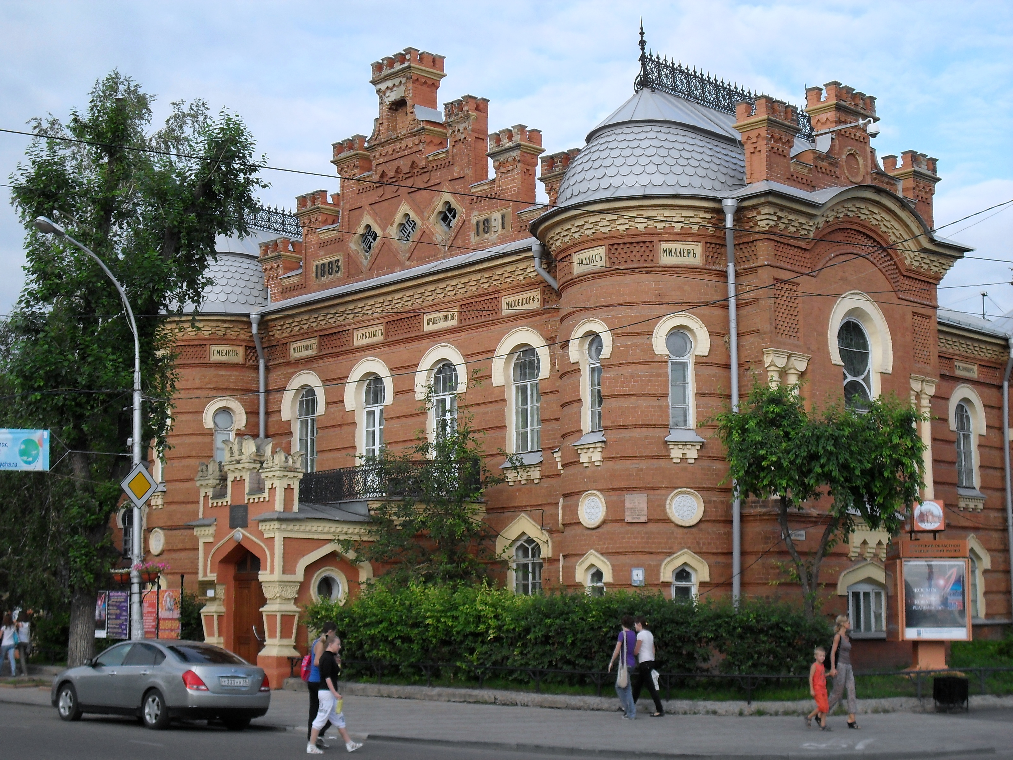 Иркутск. Краеведческий музей. 1883 год.